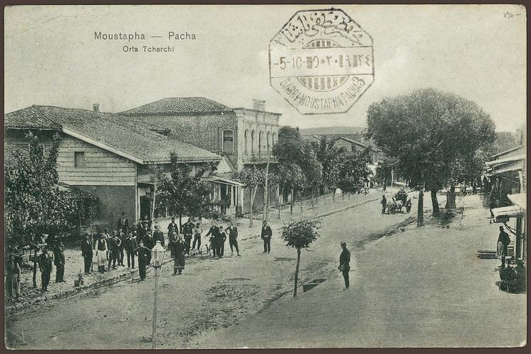 Свиленград, Орта чаршия